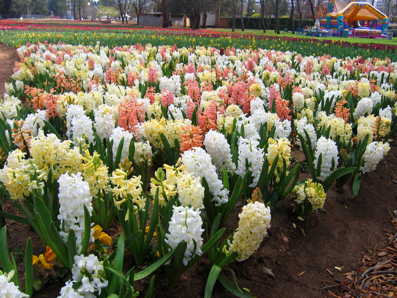 Hyacinths - Floriade, Canbaerra